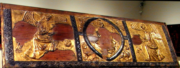 Parte superior de la urna relicario de San Cándido procedente del monasterio de Sant Cugat del Valles (Barcelona) Datada 1292 Se conserva en el Museo Nacional de Arte de Cataluña